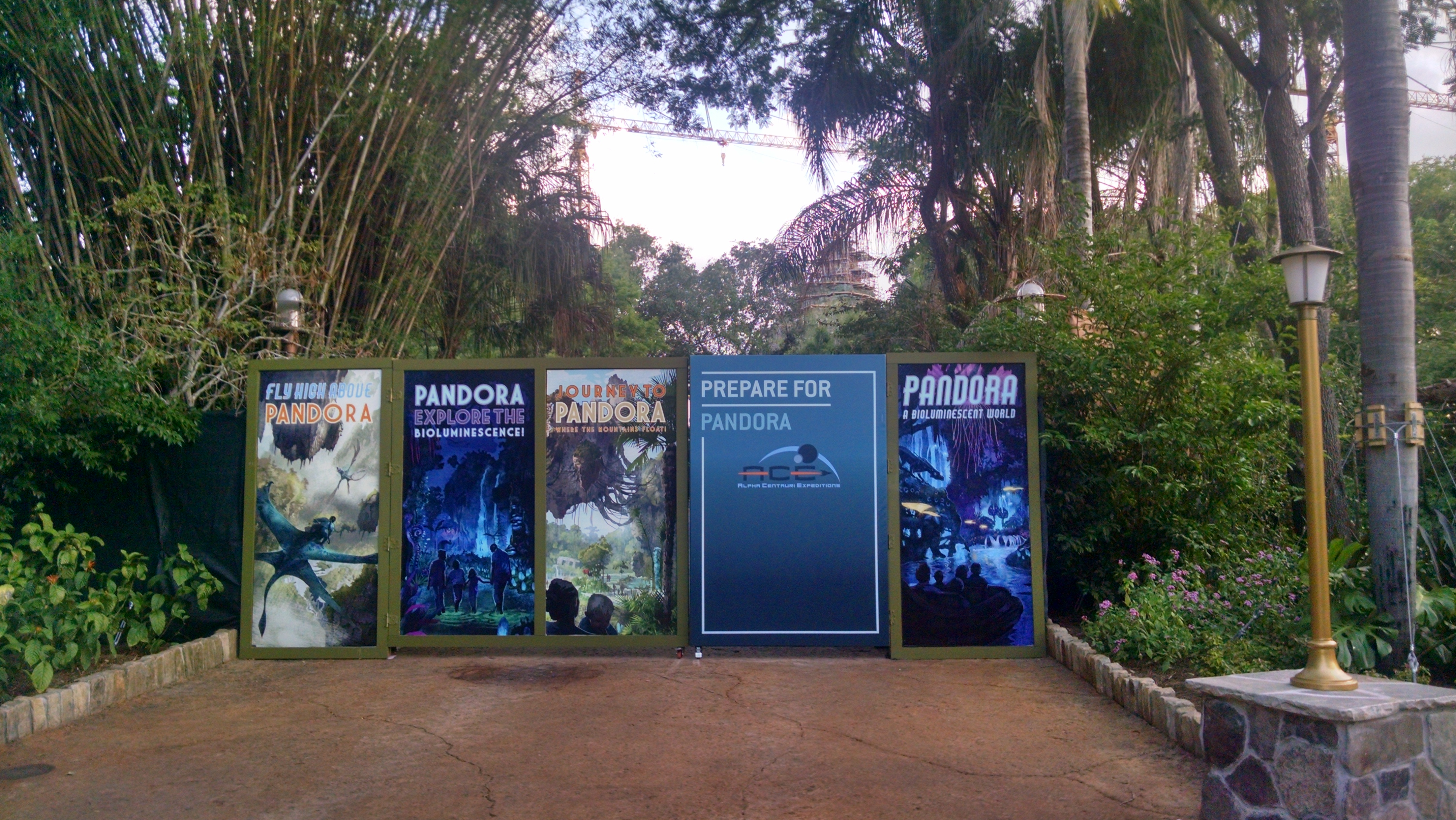 Pandora-May 28, 2016